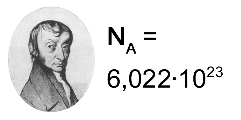 Nombre d'avogadro (separador decimal ",")